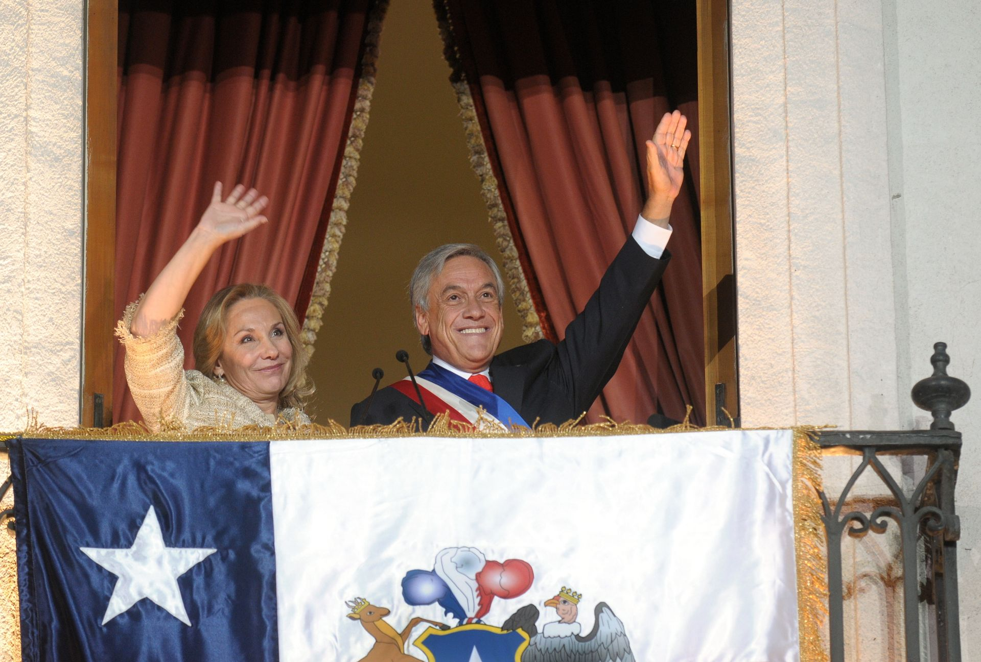 El Presidente de Chile Sebastián Piñera, junto a su esposa Cecilia Morel en un balcón de la Moneda. Postales de los 100 primeros días de Gobierno.